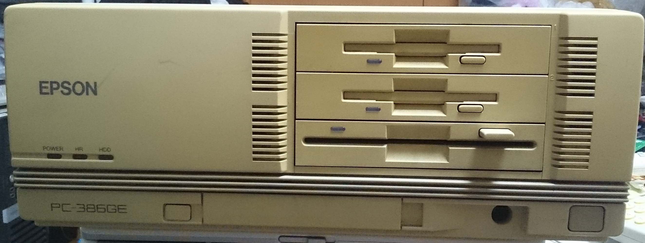 PC-386の前面